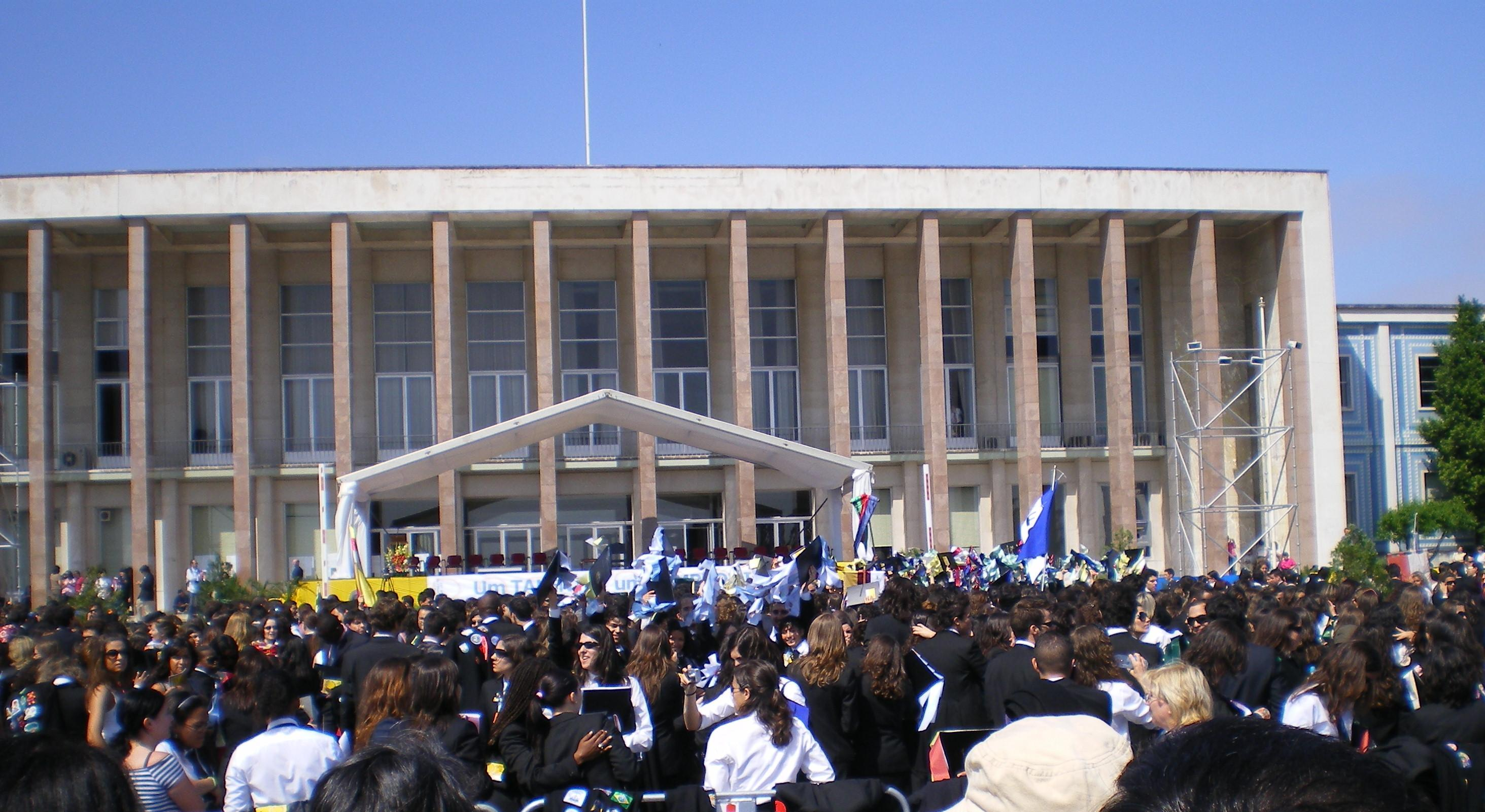 Benção de finalistas na Alameda da Universdade de Lisboa